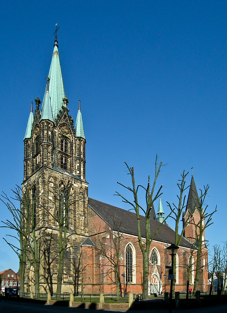 Kirche und Turm St. Martin